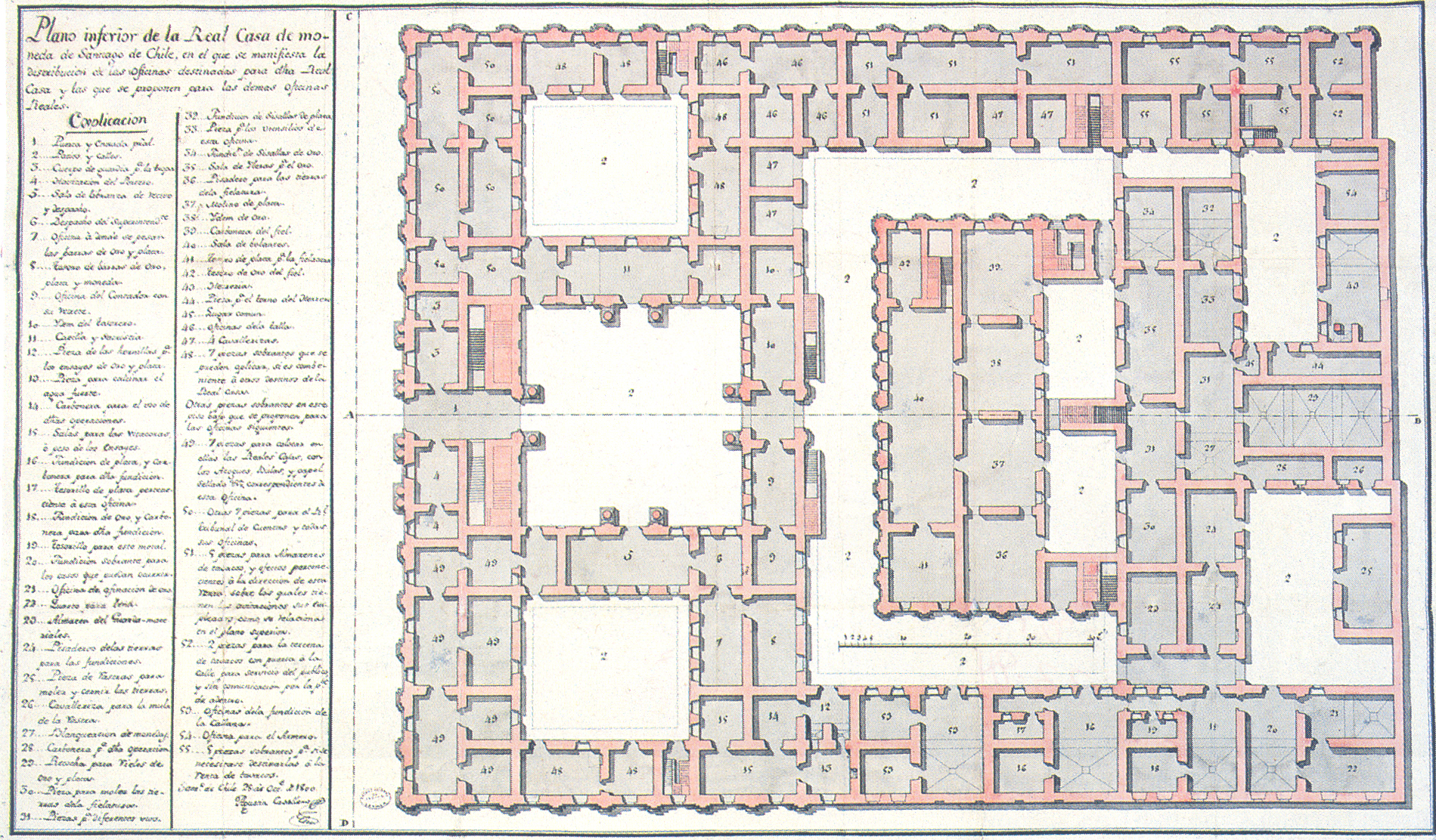 Plano inferior de la real casa de moneda (1800), Santiago de Chile.